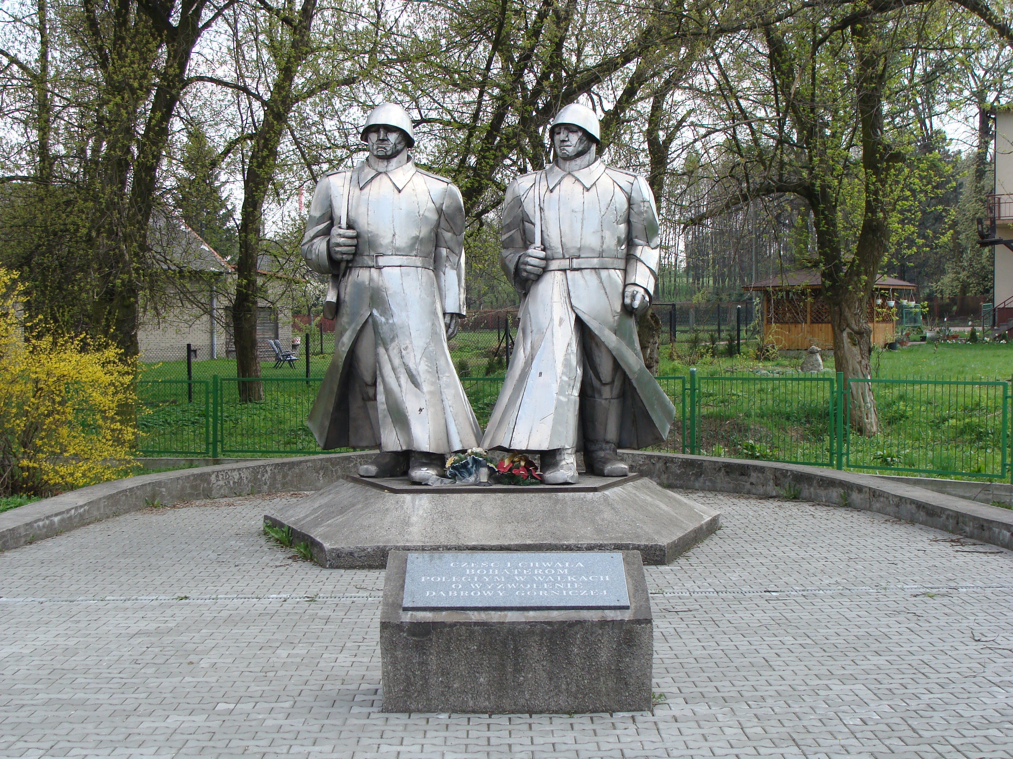 Dąbrowa Górnicza - Łosień - Pomnik